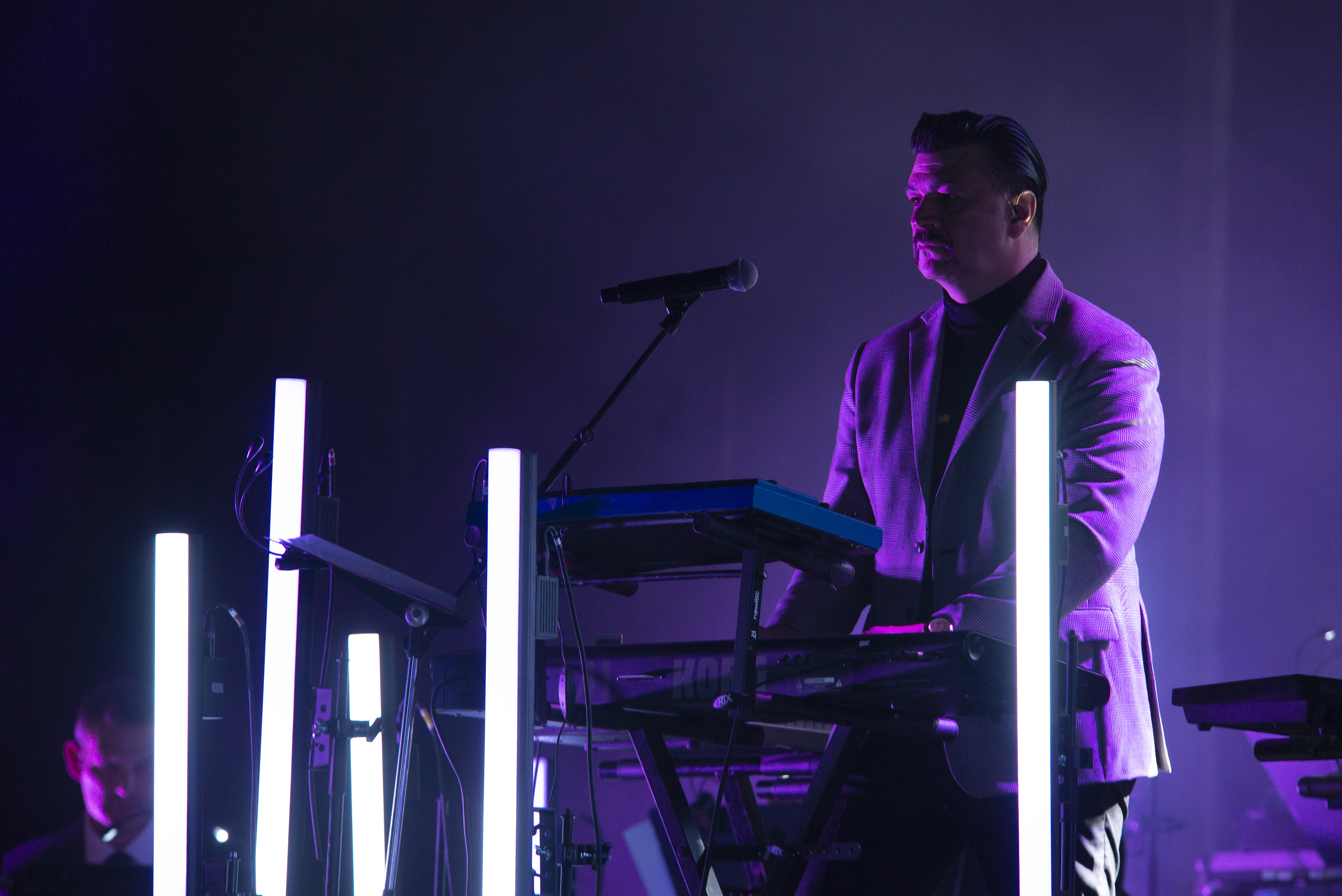 Concert d'Arnaud Rebotini & the Don Van Club au festival Papillons de nuit 2019 à Saint-Laurent de Cuves, Manche, Normandie.